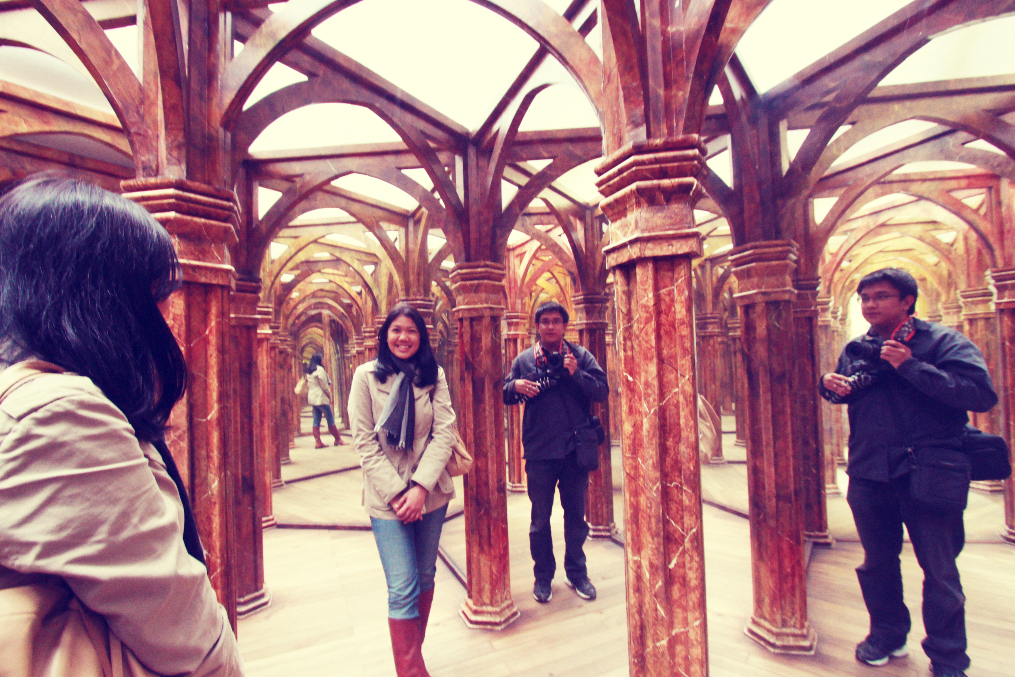 Výstavní pavilón - Bludiště (Malá Strana), Praha 1, Petřínské sady, Malá Strana